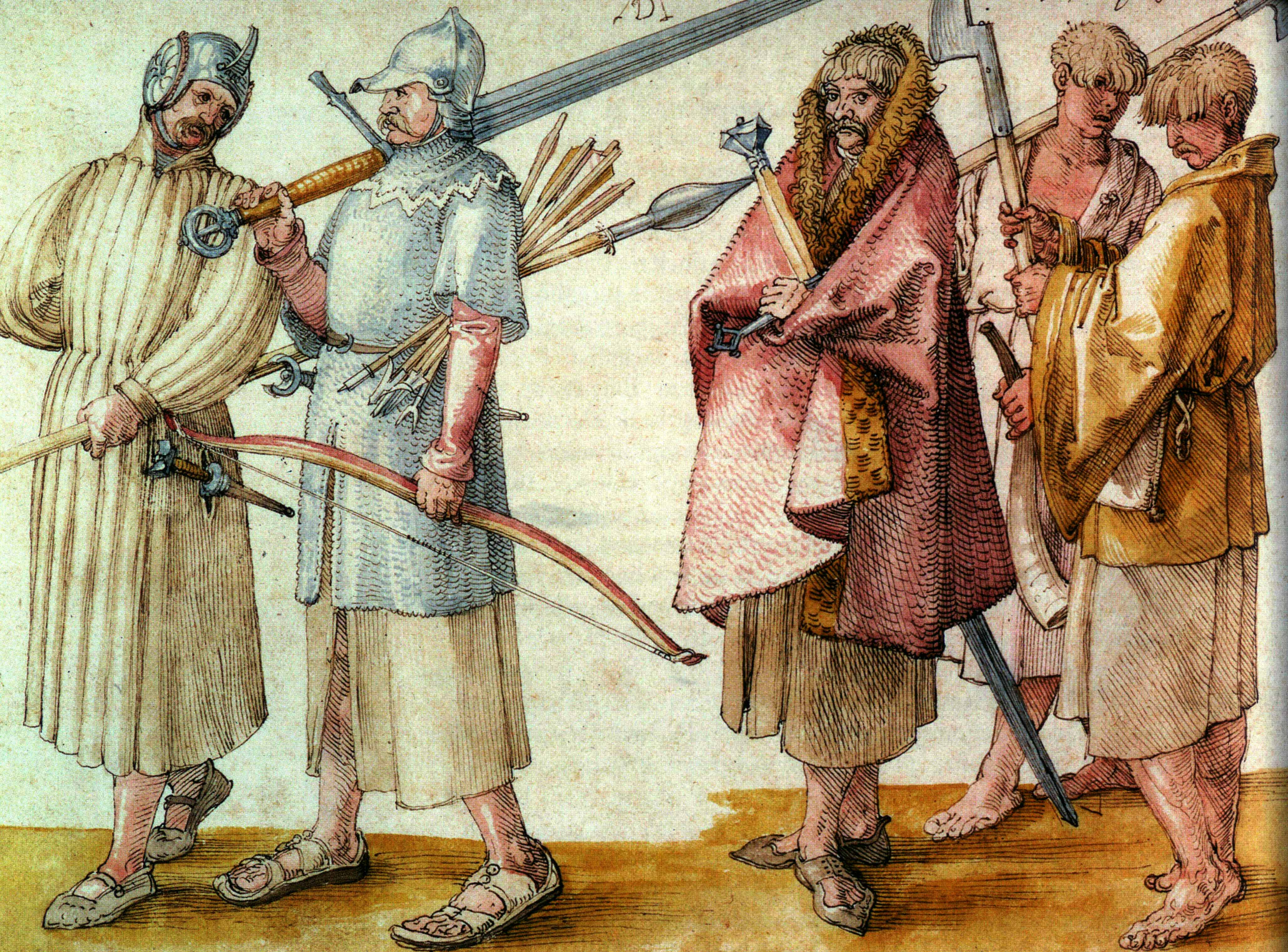 Рисунок Альбрехта Дюрера с ирландскими наёмниками в Европе.